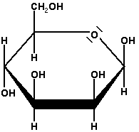 Strukturformel von Beta-Mannose (simple structural formula of beta-mannose)